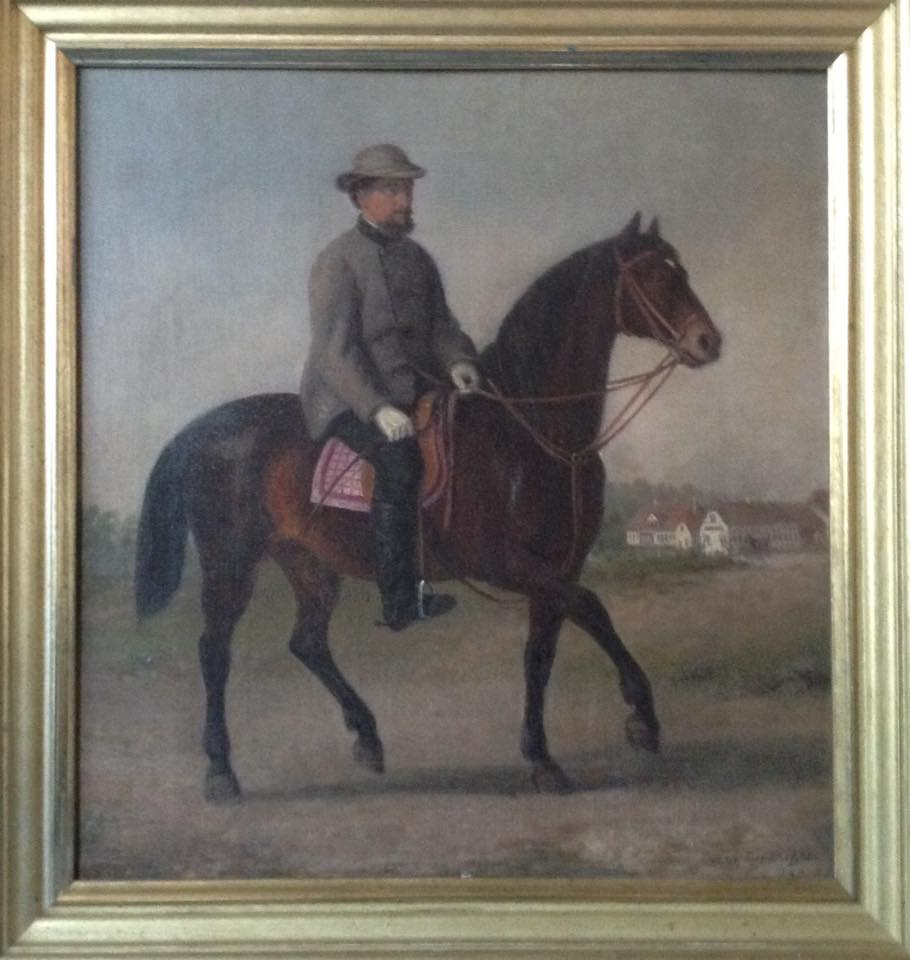 Victor Zeppenfeld (* 1834), Düsseldorfer Malerschule: Reiterbildnis (1870)